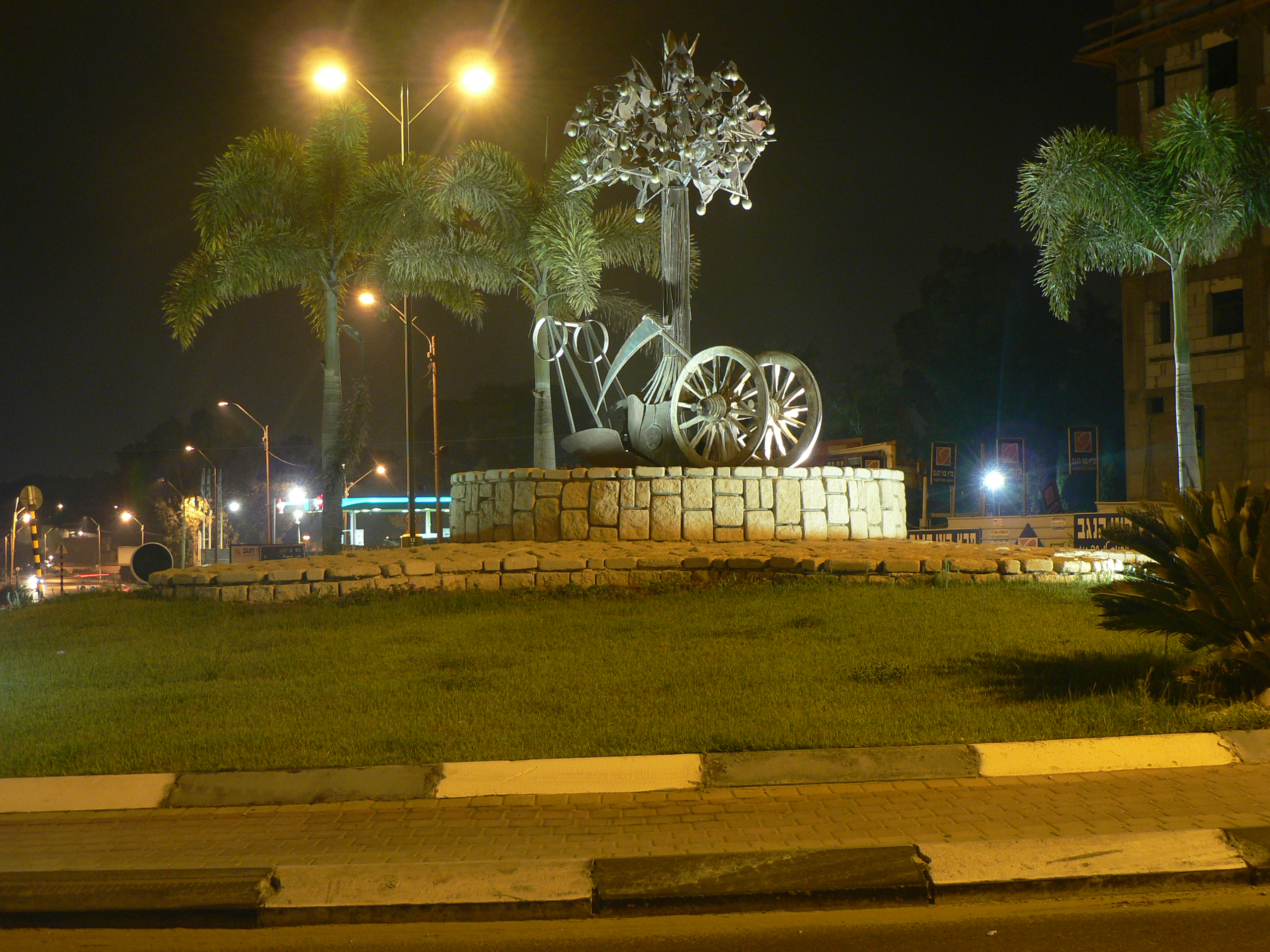 Beer Yaakov באר יעקב